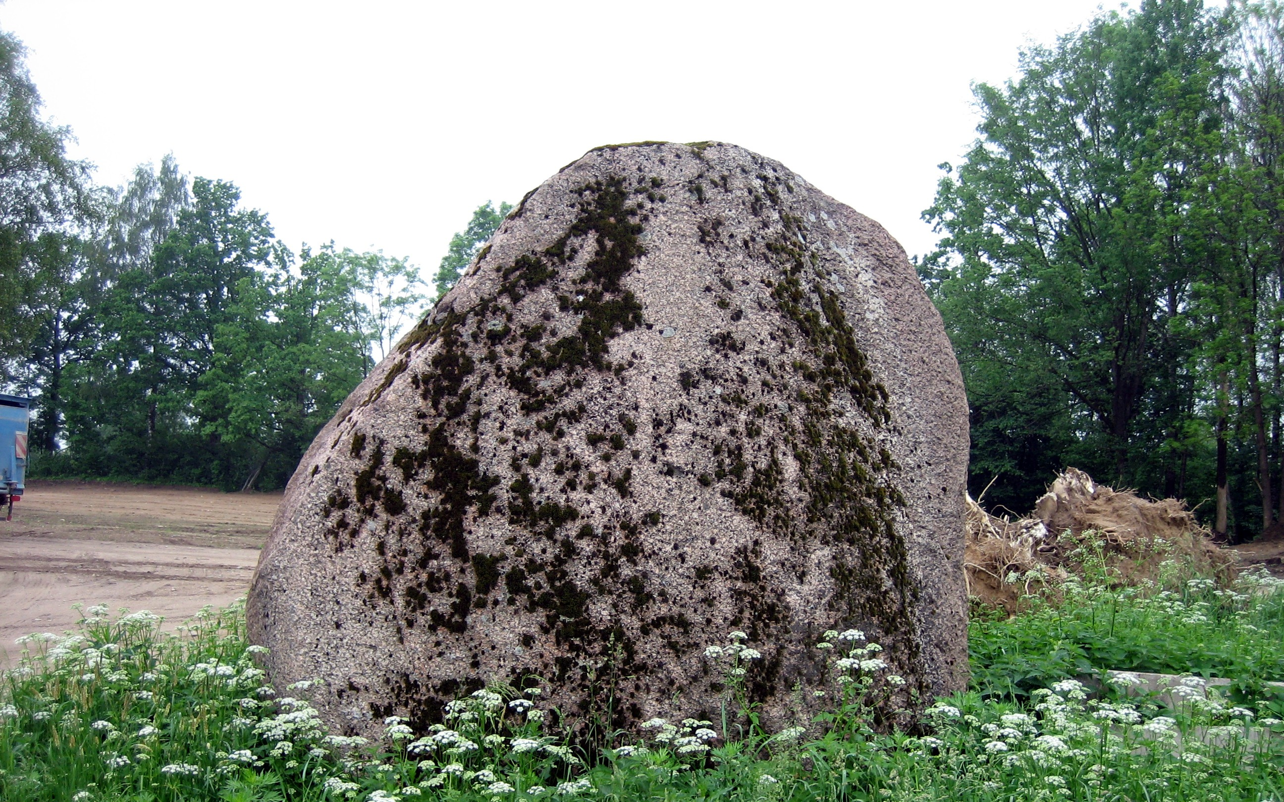 Drobūkščių akmuo